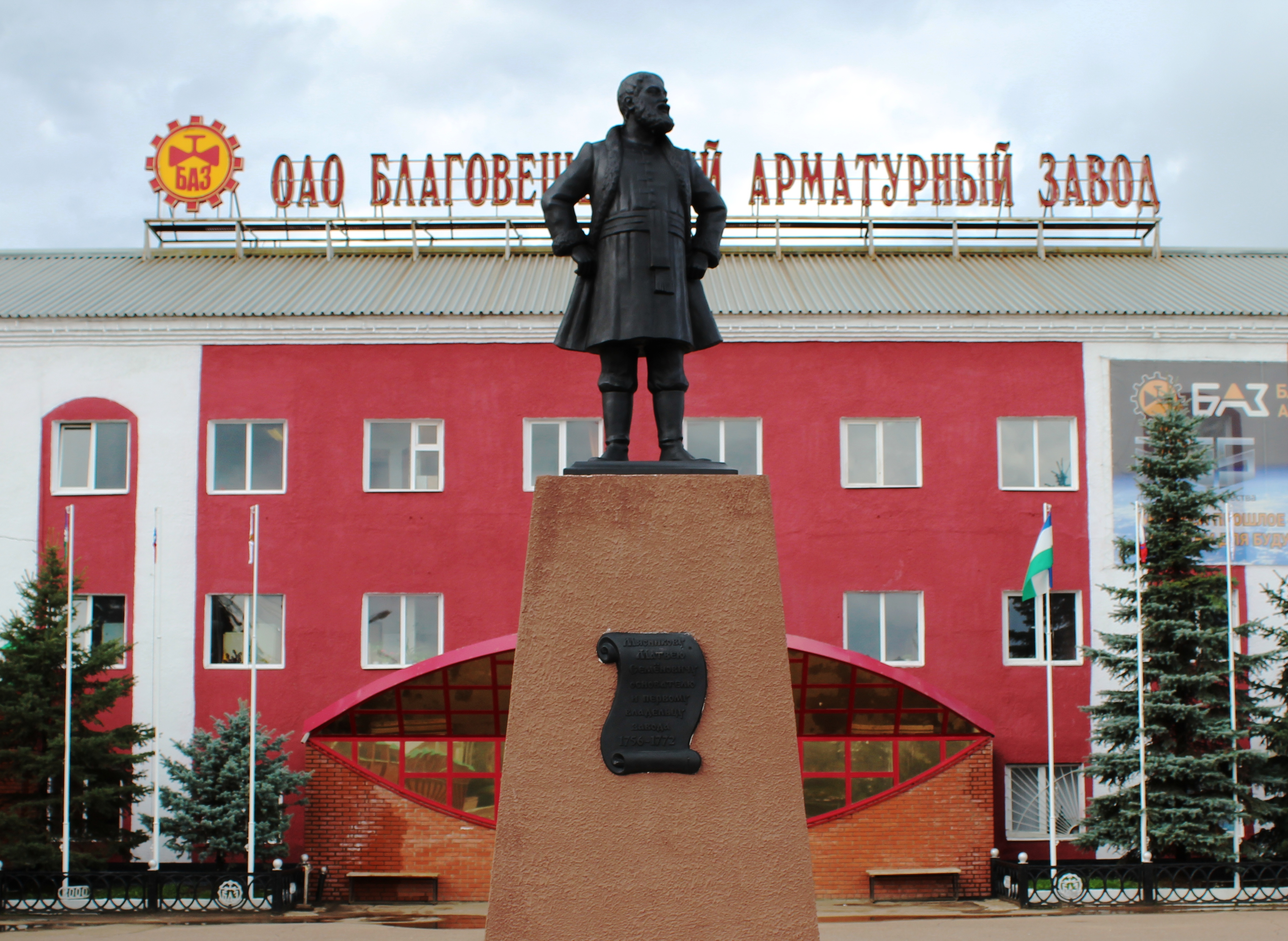 История города Благовещенска связана с основанием и строительством в 1756 году медеплавильной фабрики. В этом же году в день христианского праздника Благовещения была заложена одноимённая церковь, что и определило впоследствии название посёлка, позднее ставшего городом Благовещенском.